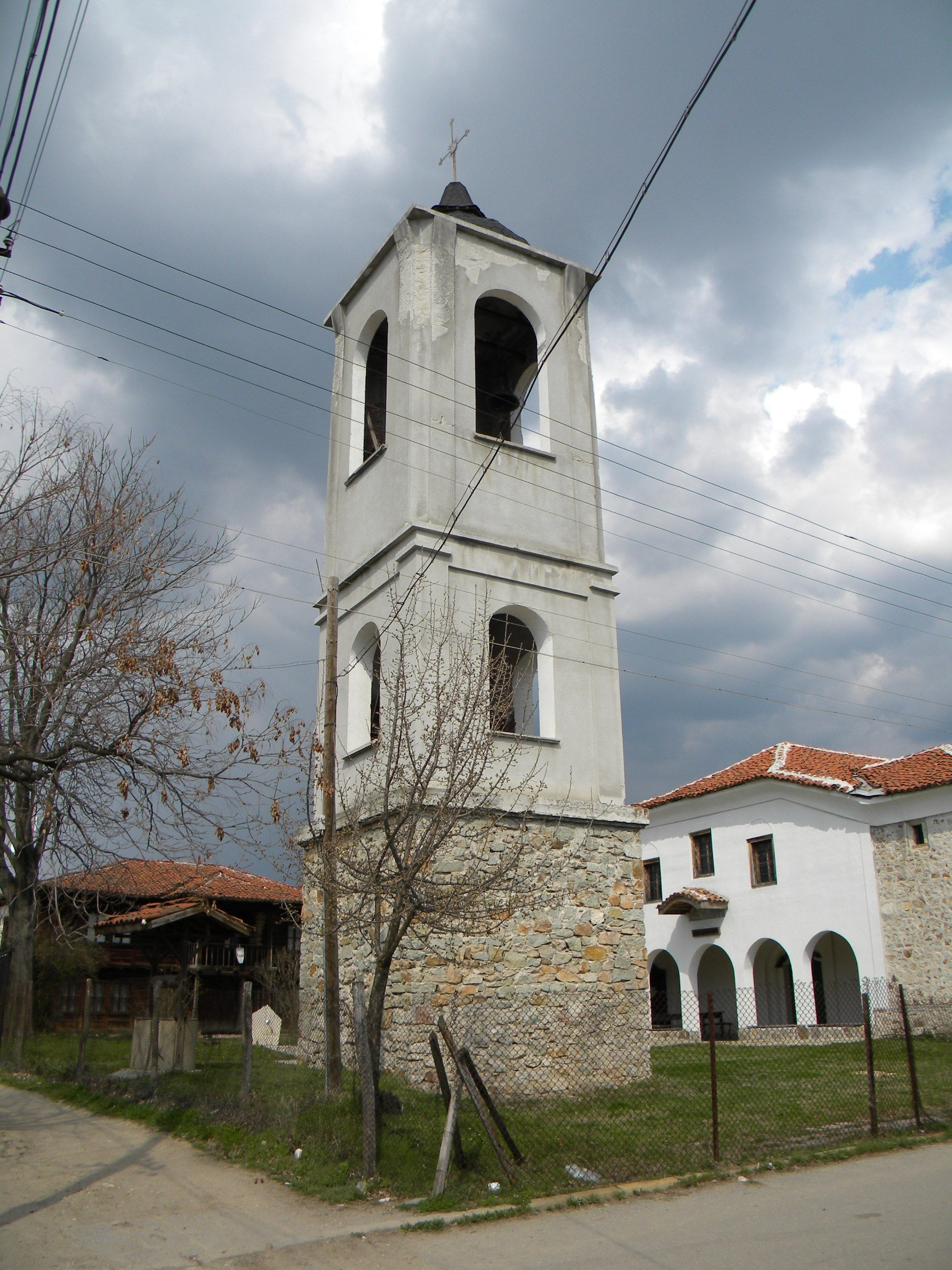 Църквата "Св. Димитърв", Брезово, България